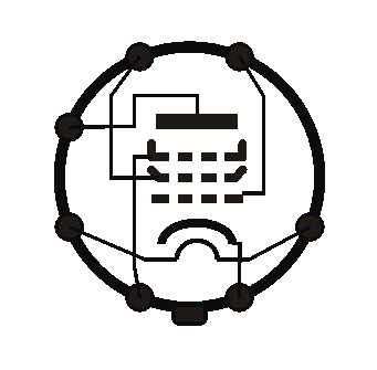 Sockelschaltbild der Elektronenroehre EL34